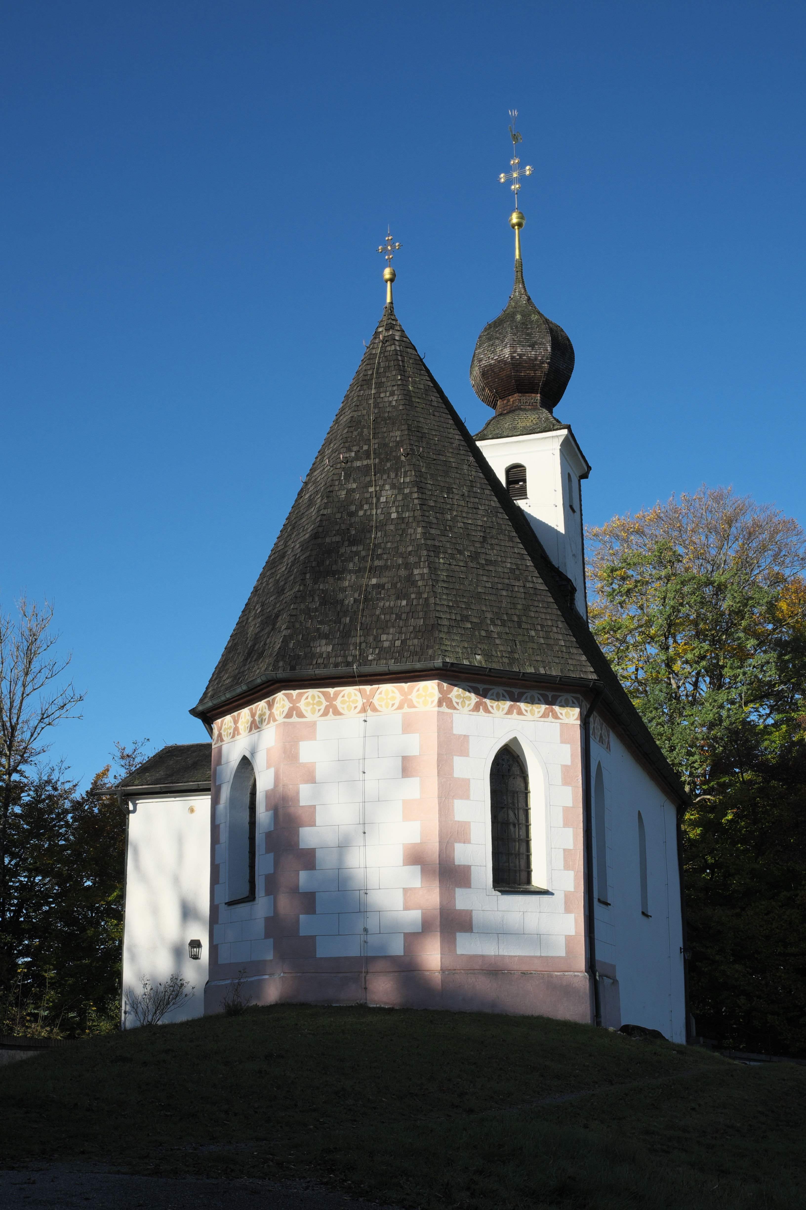 Katholische Filialkirche St. Johannes der Täufer in Sankt Johann (Siegsdorf) im Landkreis Traunstein (Bayern/Deutschland)